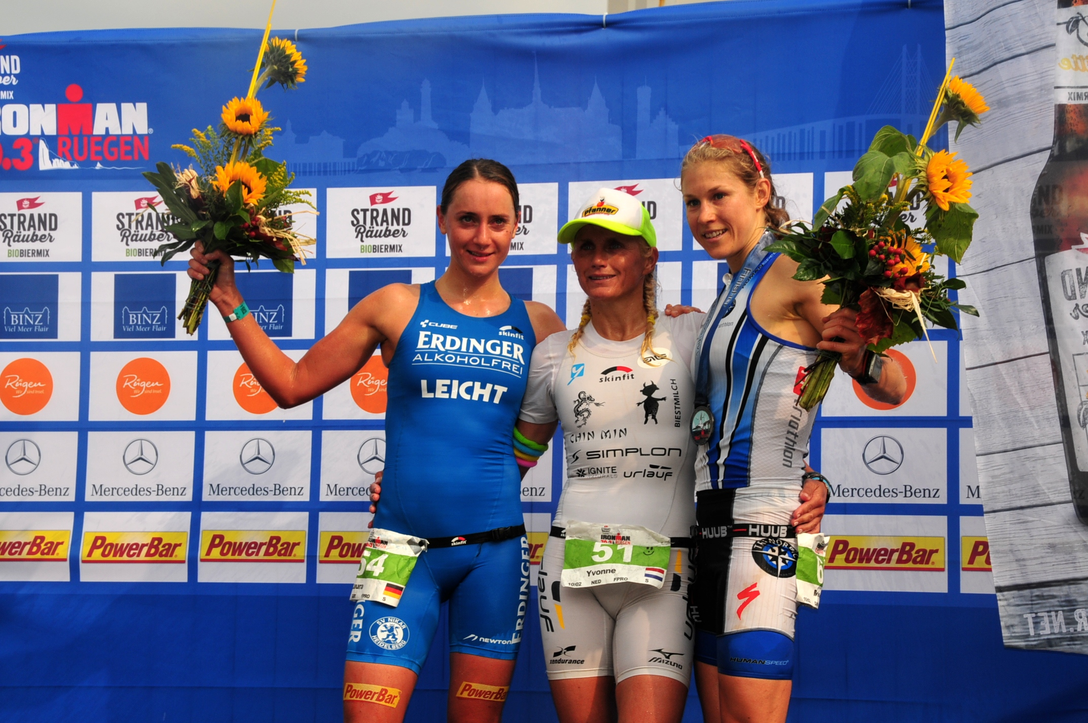 Die Sieger bei den Frauen beim IRONMAN 70.3 Rügenvon links: Laura Philipp, Yvonne van Vlerken, Maja Stage Nielsen